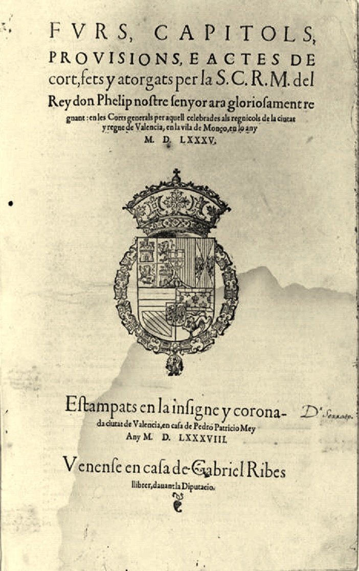 Portada dels "Fvrs, capitols, provisions, e actes de cort, fets y atorgats per la S.C.R.M. del Rey Don Phelip nostre senyor ara gloriosament regnant en les Corts generals per aquell celebrades als regnicols de la ciutat y regne de Valencia, en la vila de Monço, en lo any MDLXXXV" (1588). Valencia : en casa de Pedro Patricio Mey, 1588.